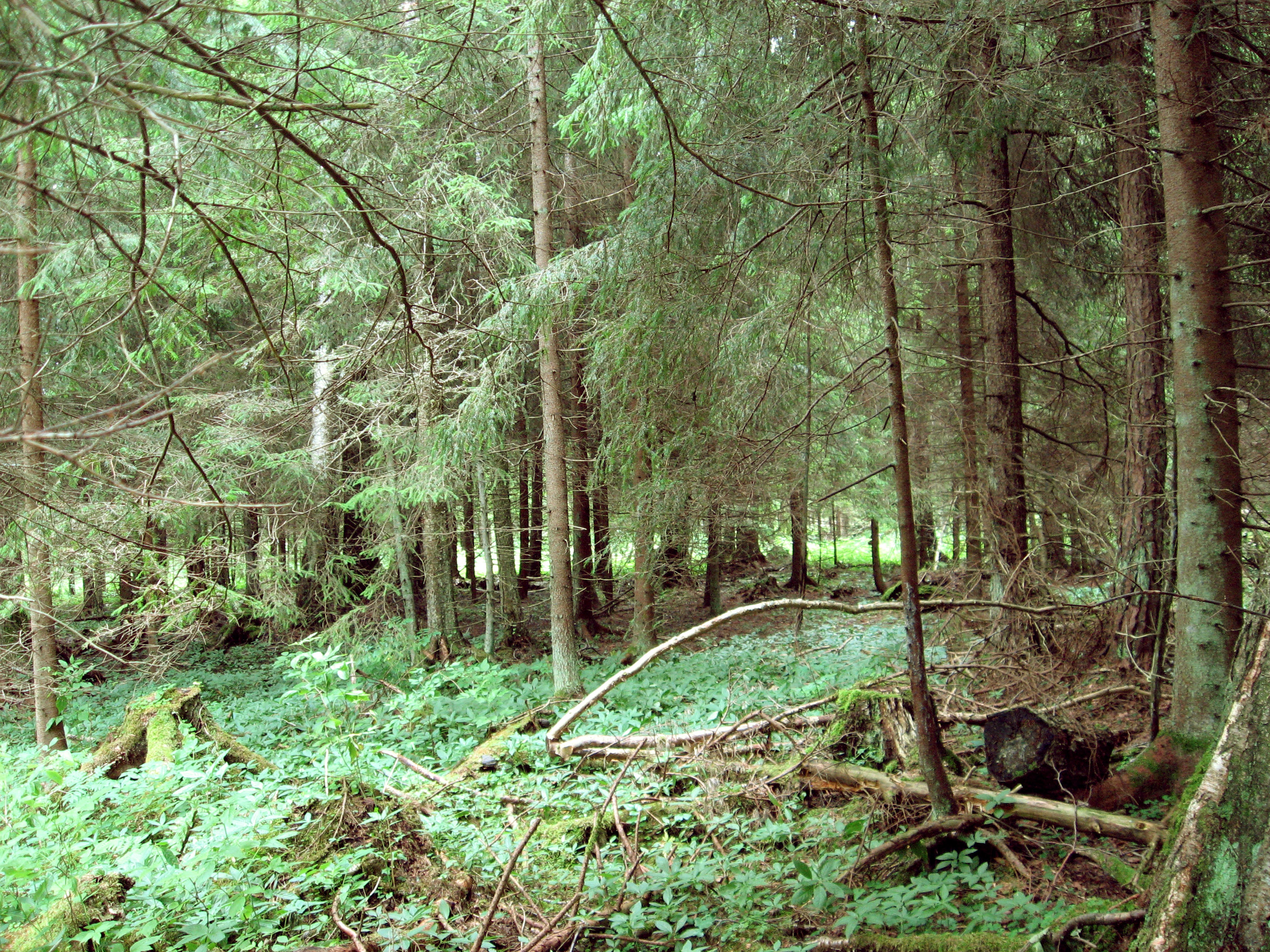 лес в окрестностях Овиши